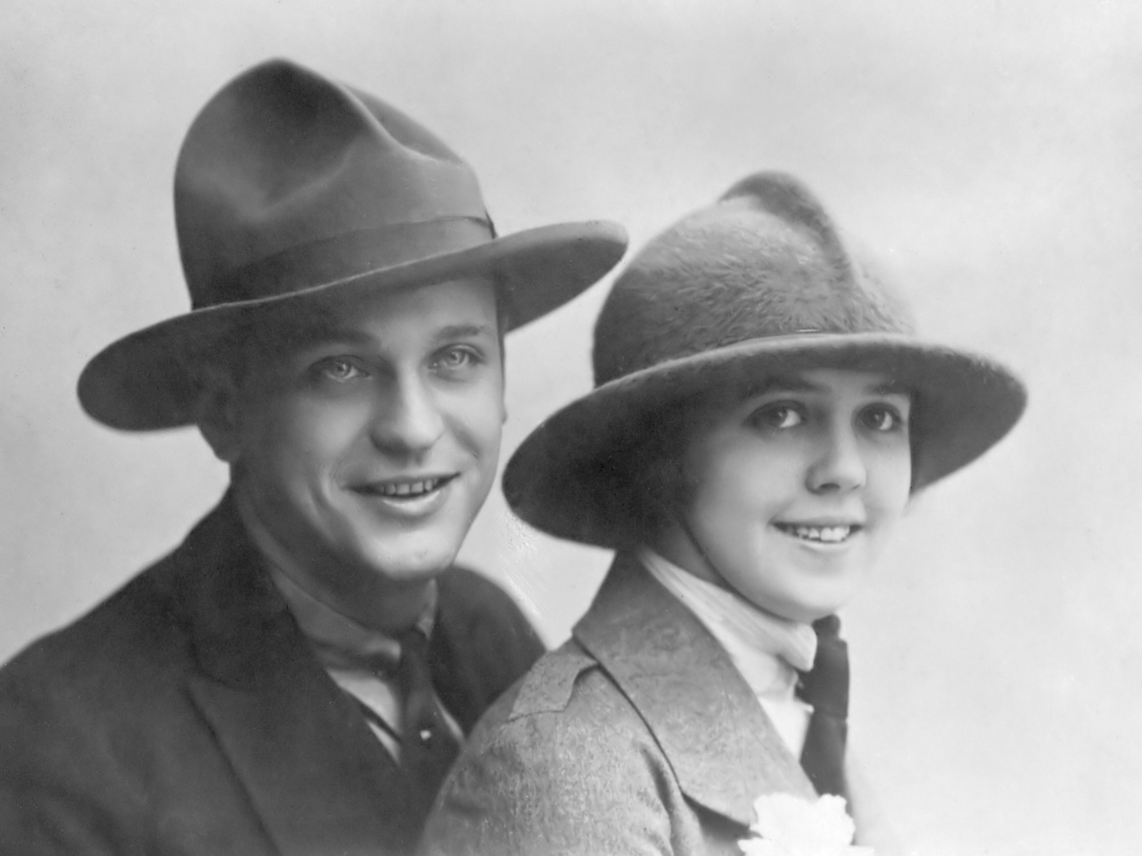 Acteurs Theo Frenkel jr. en Lily Bouwmeester, die in het huwelijk zullen treden 1921